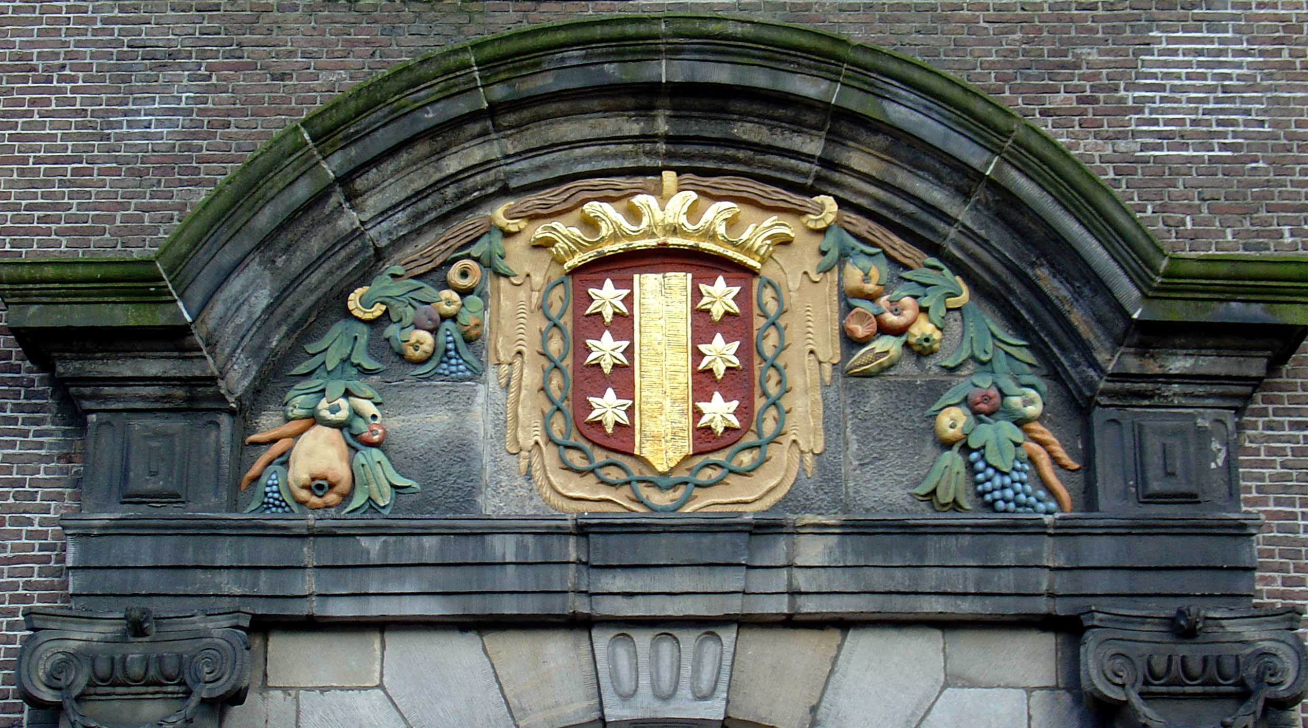 Gevelversiering voormalige kapel van het Catharina gasthuis Gouda. Gevelsteen/ fronton uit 1665, van 1892 tot 1967 werd de boekencollectie van de Sint Janskerk in de Gasthuiskapel ondergebracht, daarna werd het een expositieruimte van Museum Catharina Gasthuis.